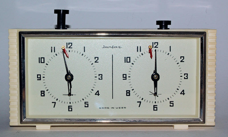 schaakklok na het vallen van de vlag